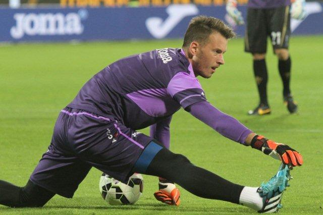 Il portiere di calcio brasiliano Norberto Murara Neto, noto più semplicemente come Neto (Araxá, 19 luglio 1989), in allenamento alla Fiorentina nel 2014.